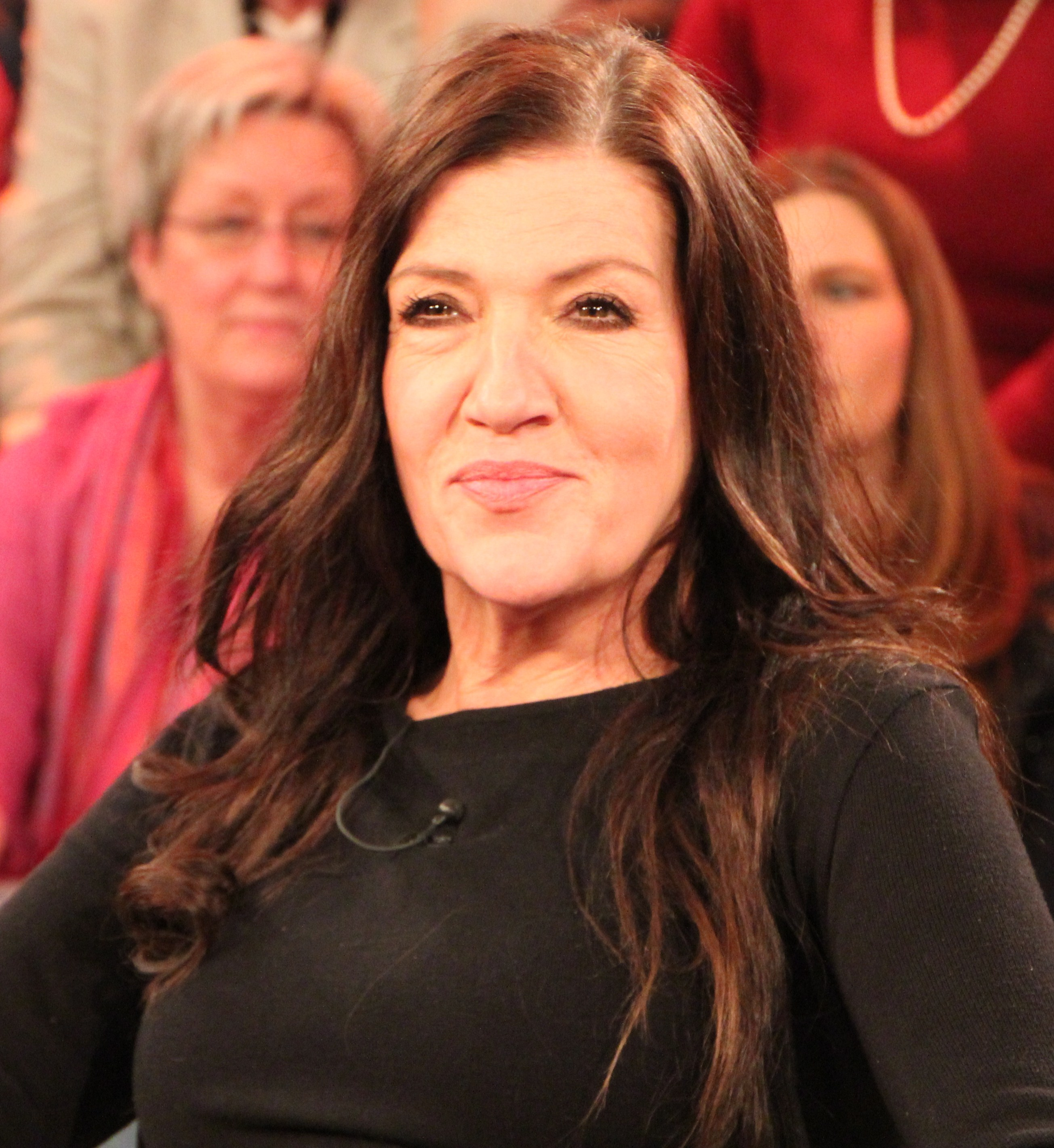 Katy Nina Karrenbauer (* 31. Dezember 1962 in Duisburg) ist eine deutsche Schauspielerin, Sängerin und Autorin.